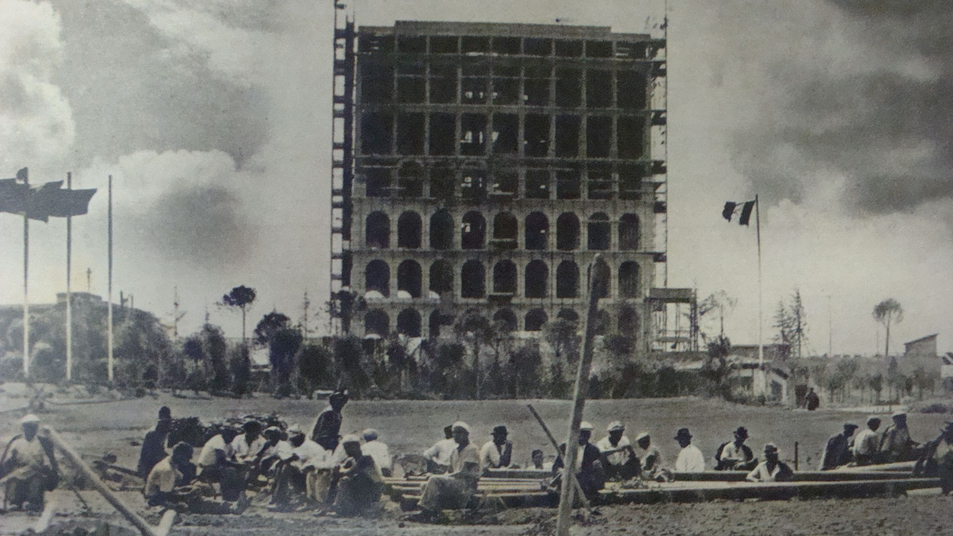 Ora della sosta nel cantiere dell'E.42 - Palazzo della Civiltà Italiana